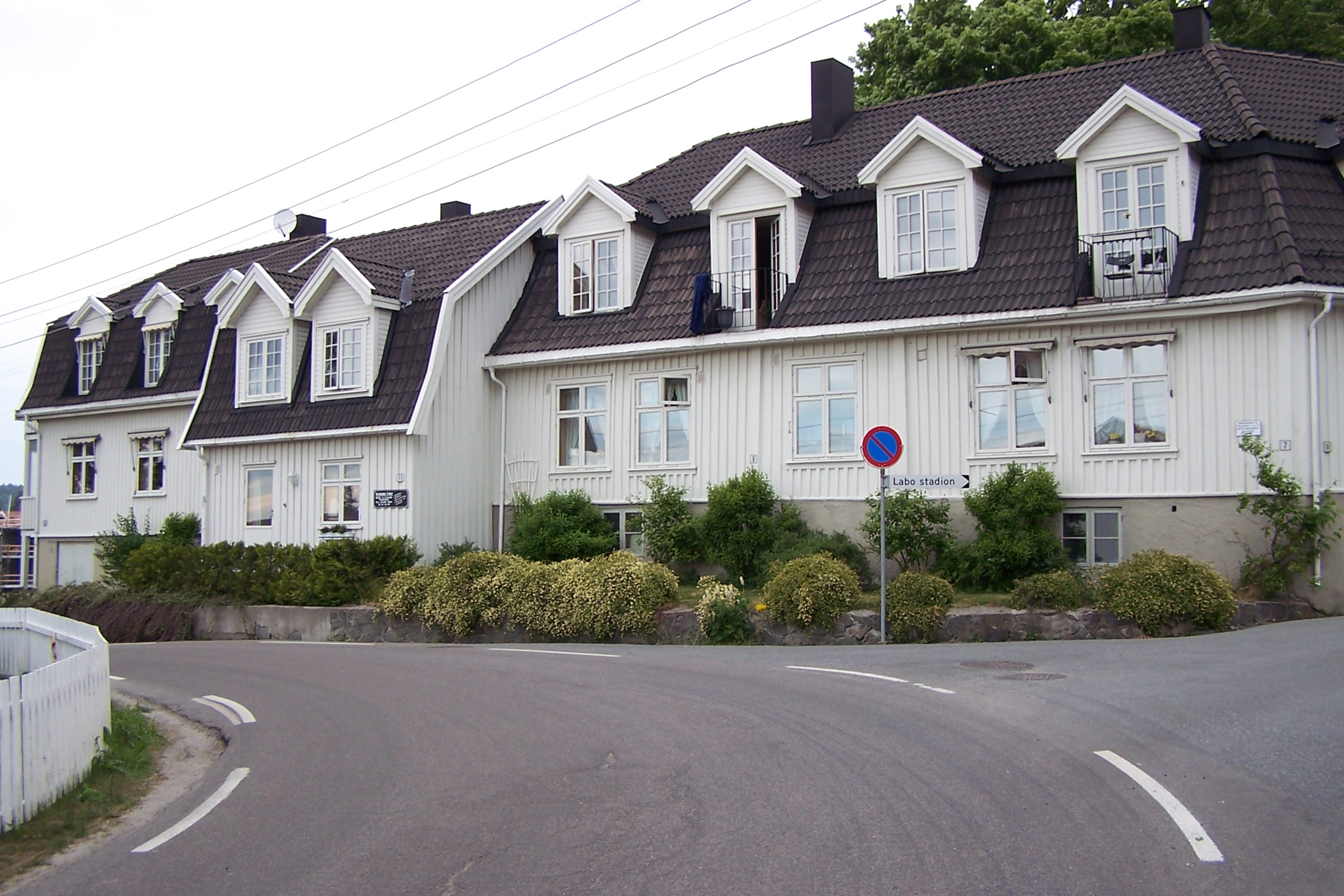 Son, Norway: Kaja Hansens Minde